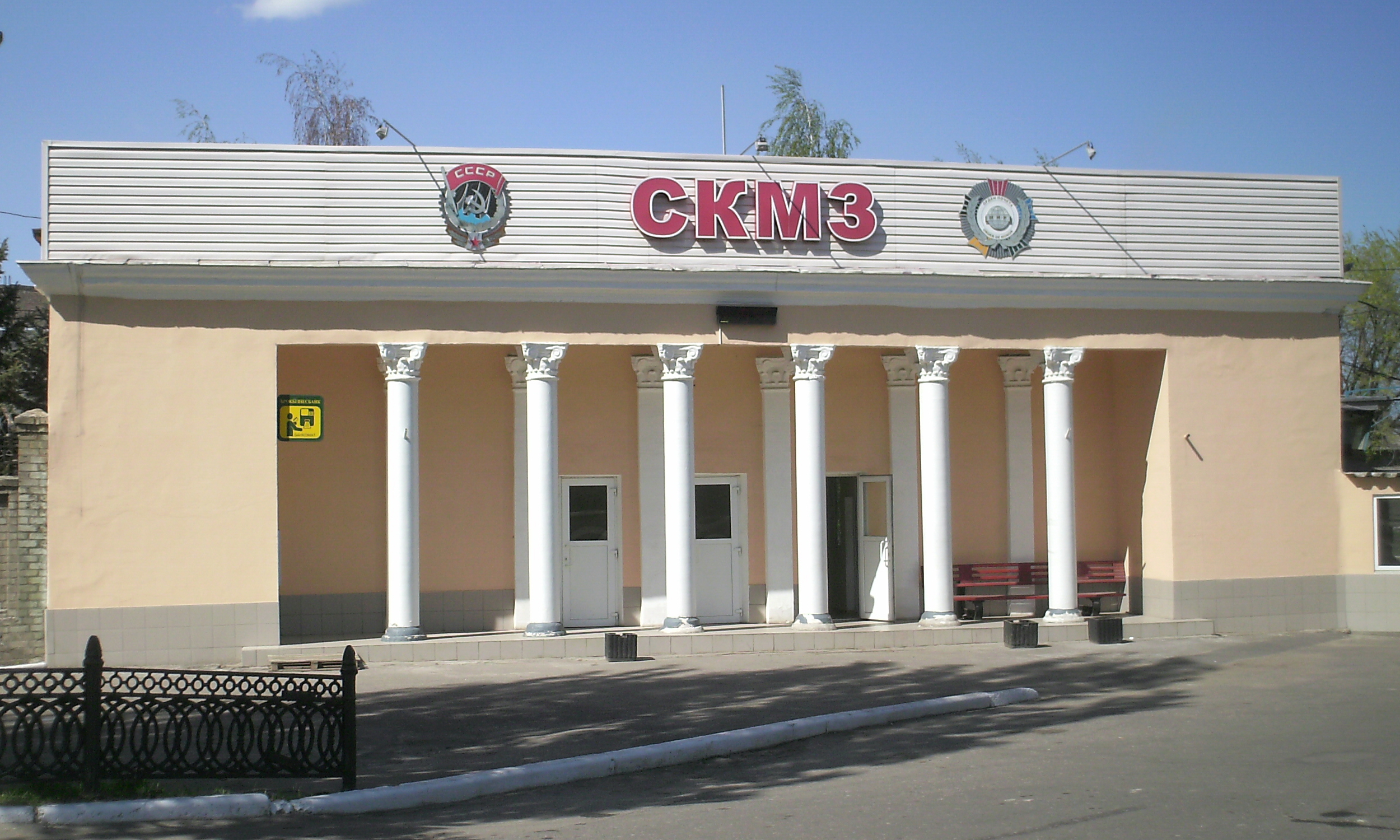 Краматорск, СКМЗ